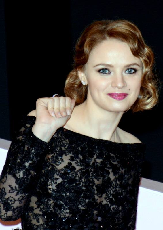 Sara Forestier à la cérémonie des César